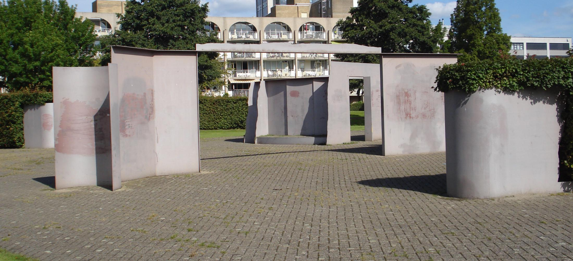 Zoetermeer, Dobbe-eiland. Kunstwerk "Dobbe-eiland" van Kees Verschuren. The Netherlands. FOP.